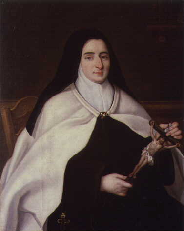 Mère Thérèse de Saint-Augustin; Madame Louise de France (1737-1787)